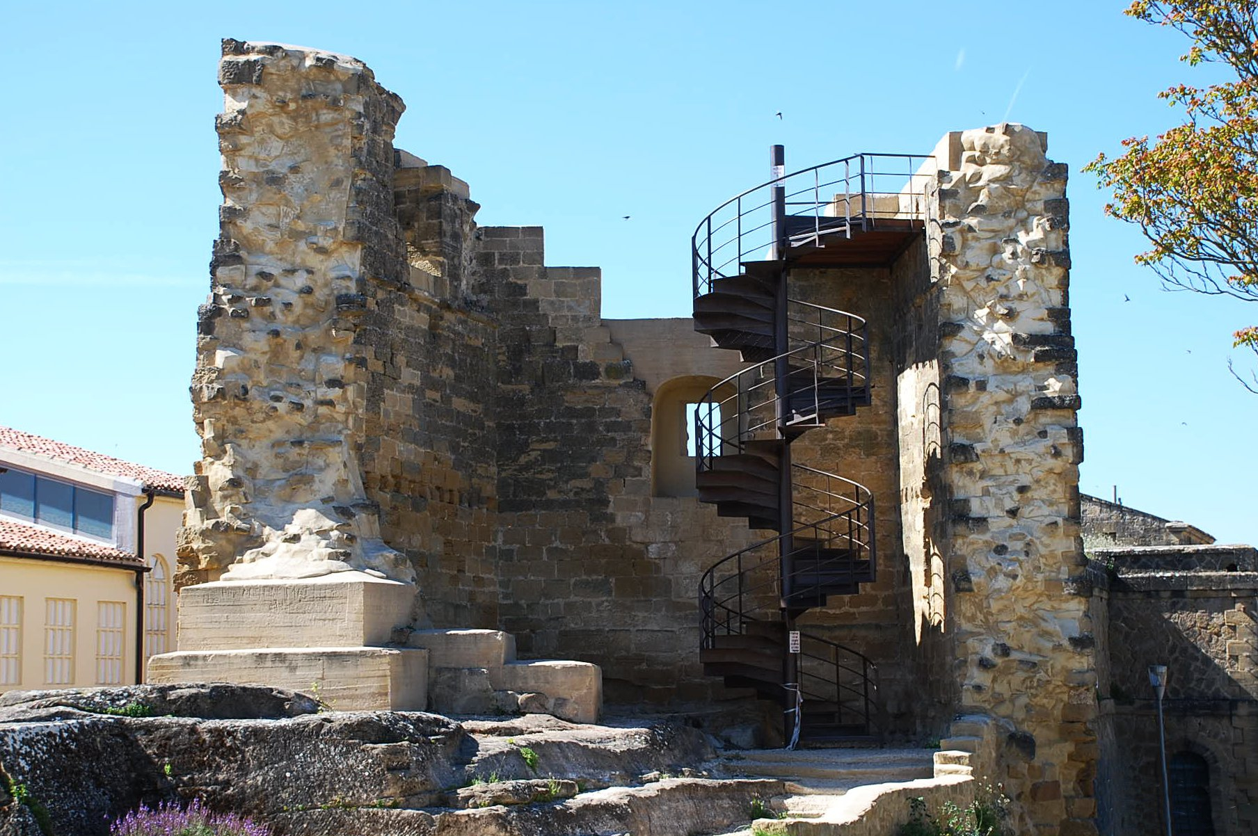 Castillo de Briones en La Rioja - España.